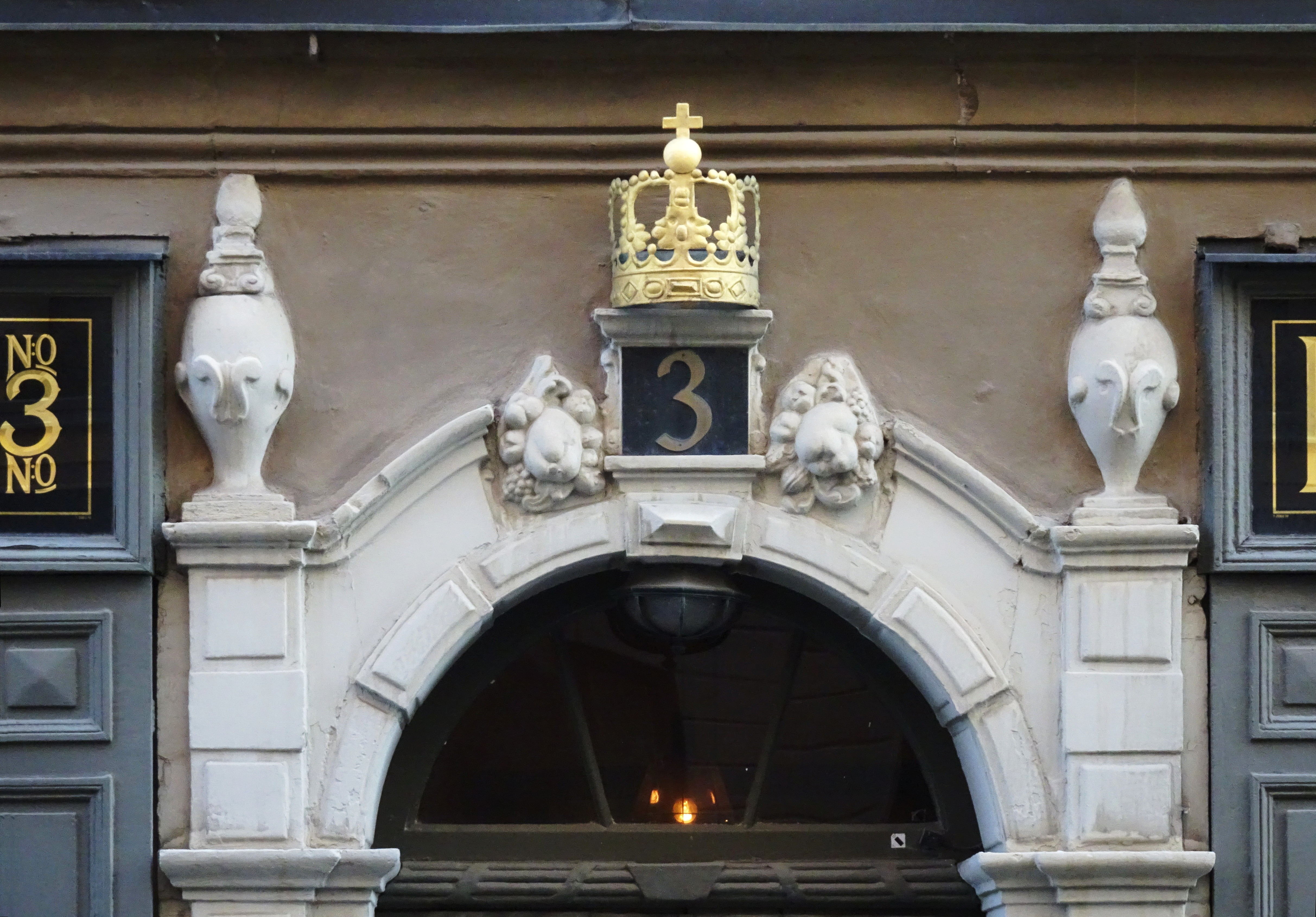 Apoteket Kronans gamla signum vid Storkyrkobrinken 3